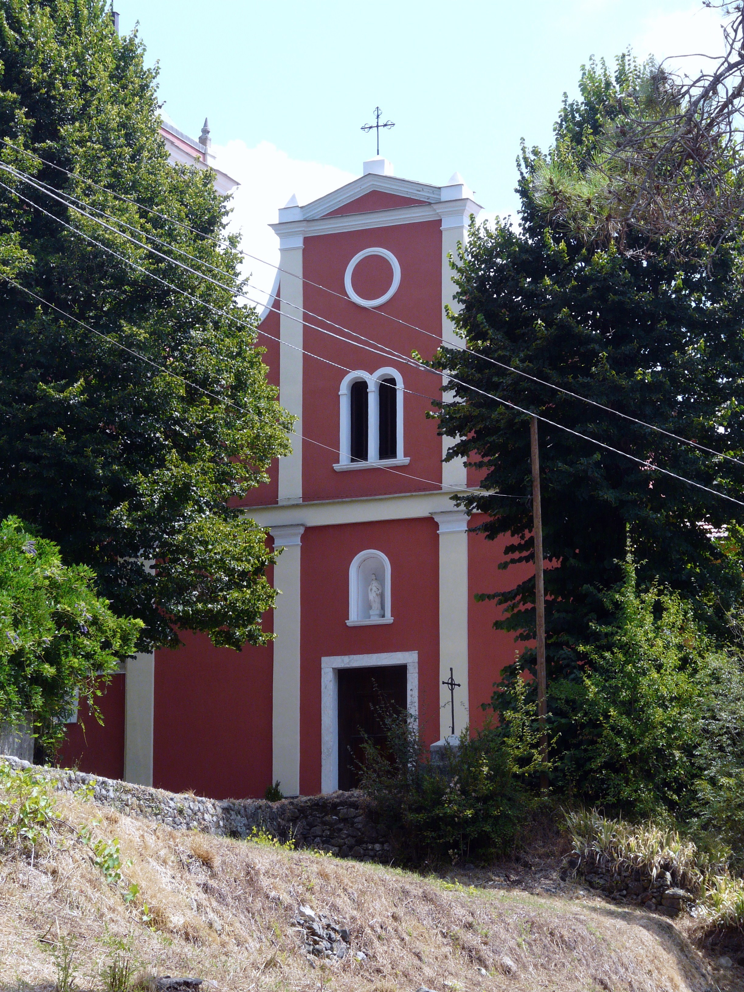 Chiesa di San Martino, Cavanella Vara, Beverino, Liguria, Italia